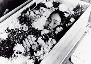 佐々木禎子永眠（1955年10月）